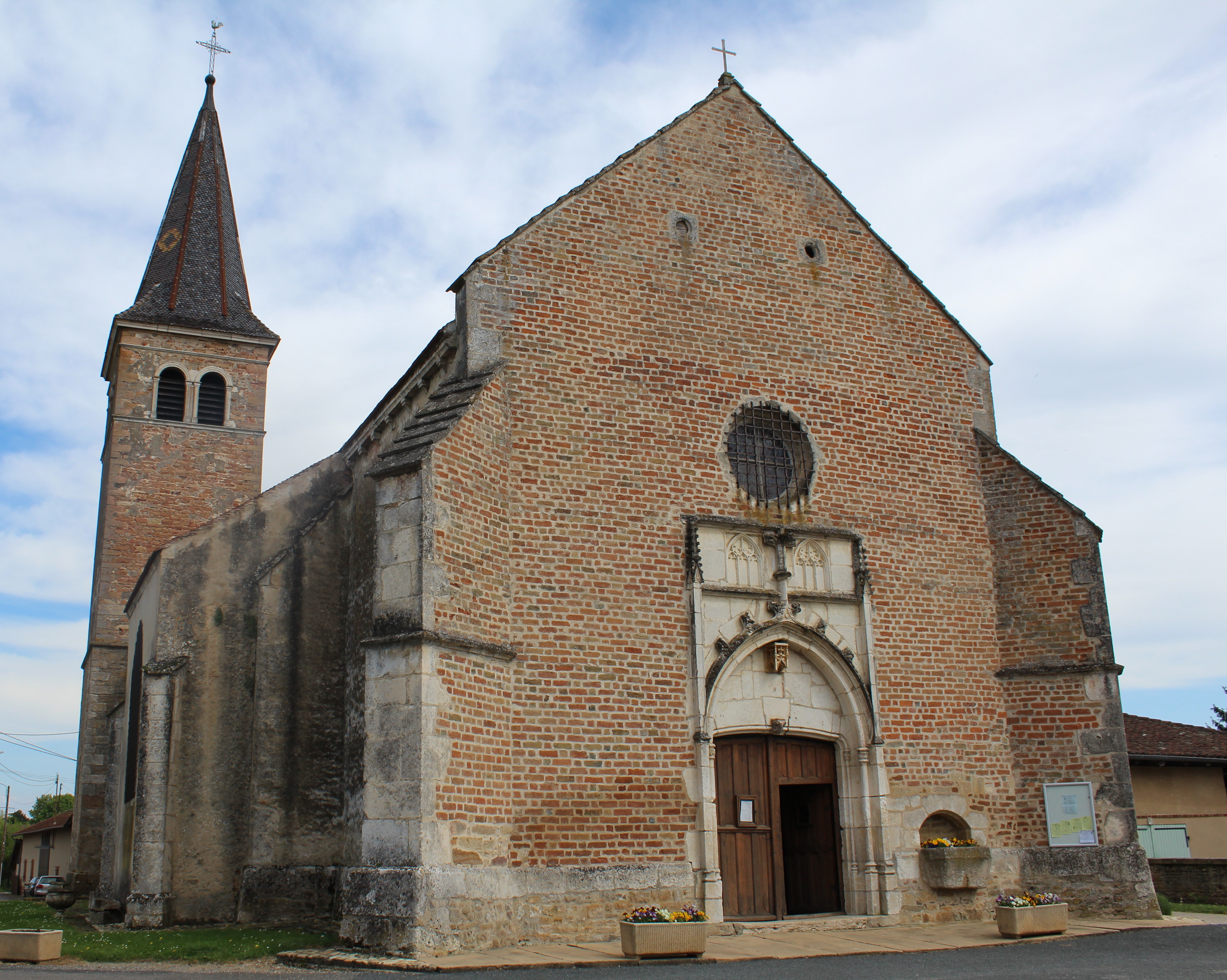 Église Saint-Jean-Baptiste dans le village de Saint-Jean-sur-Veyle.